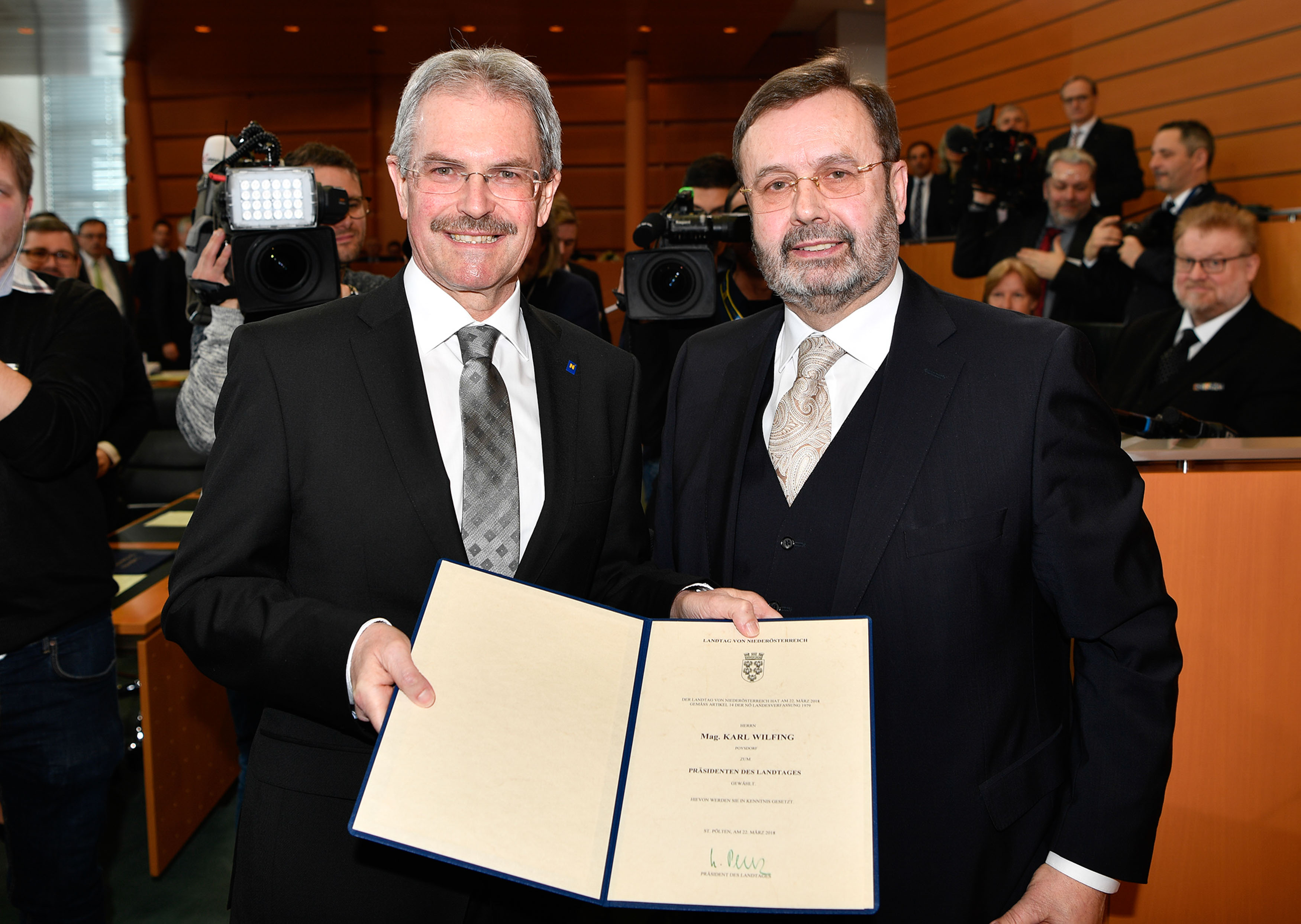 Am 22. März 2018 konstituierte sich der NÖ Landtag neu. Karl Wilfing wurde von den 56 Abgeordneten einstimmig als neuer Präsident des Landtages gewählt.